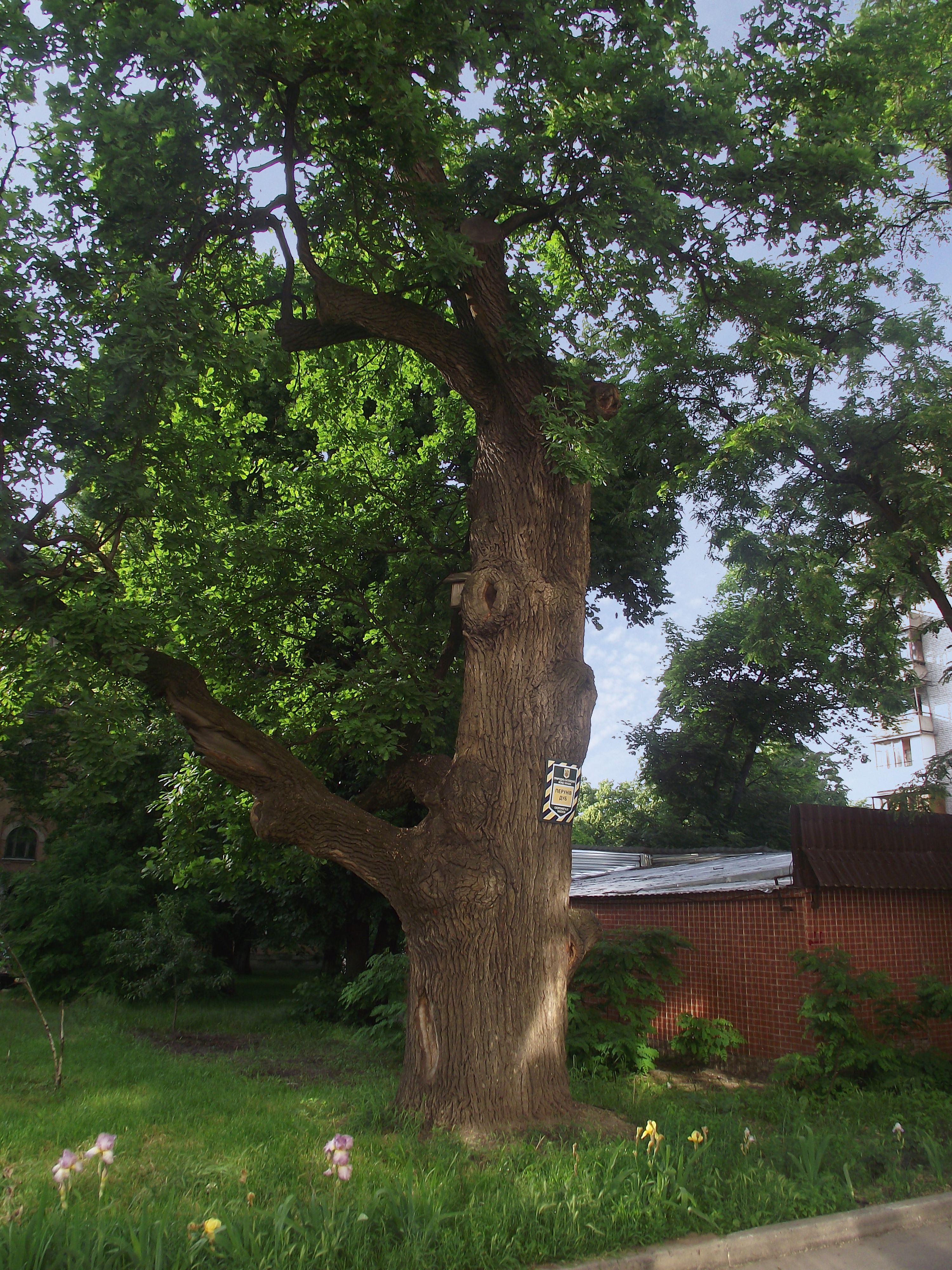 Близько 400 років. Обсяг 4,6 м. Висота 15 м.